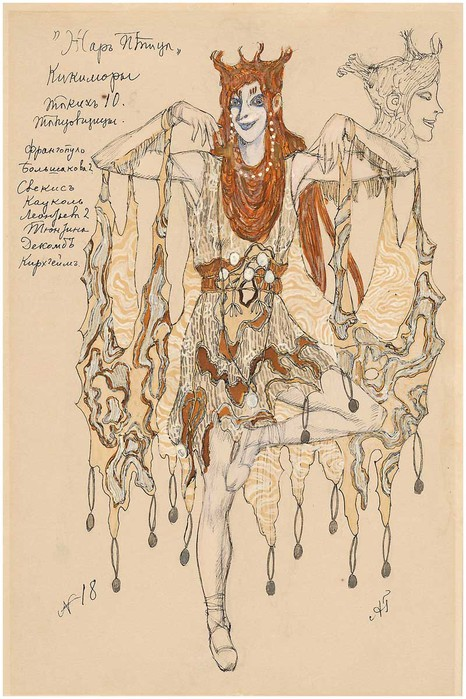 Головин А.Я. Эскизы костюмов к балету "Жар-Птица".